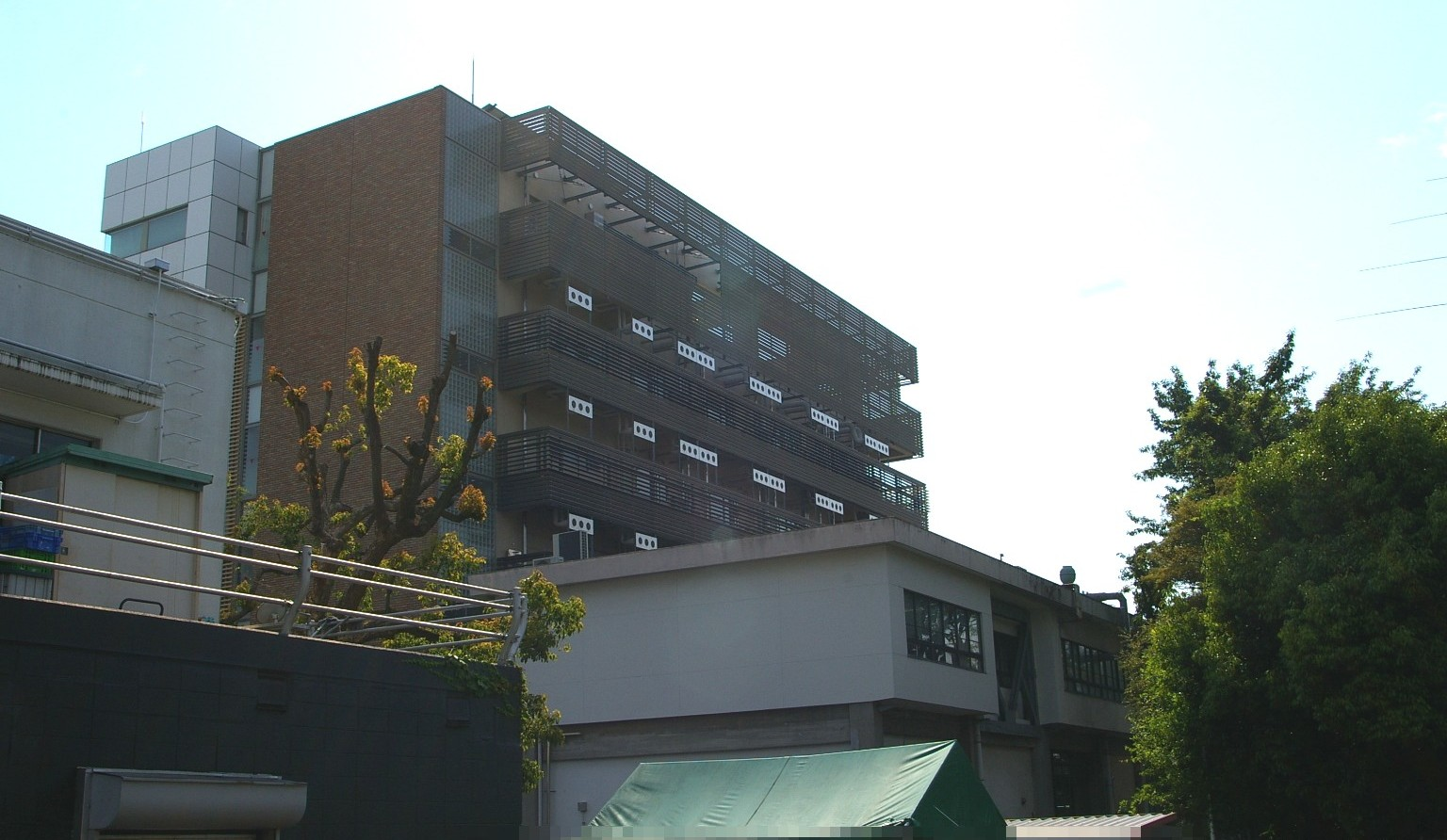 愛知県名古屋市